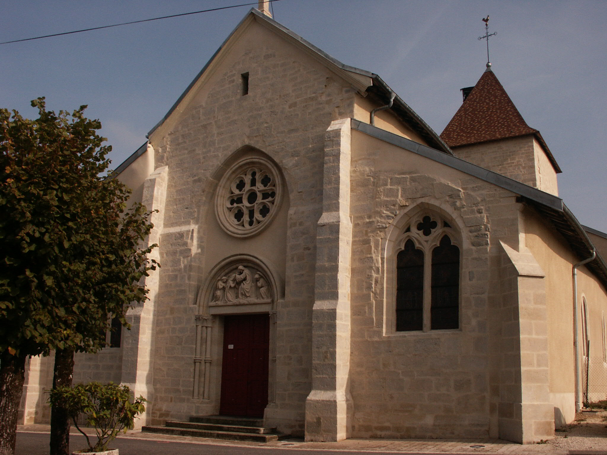 Vue sur le portail de l'église de la nativité